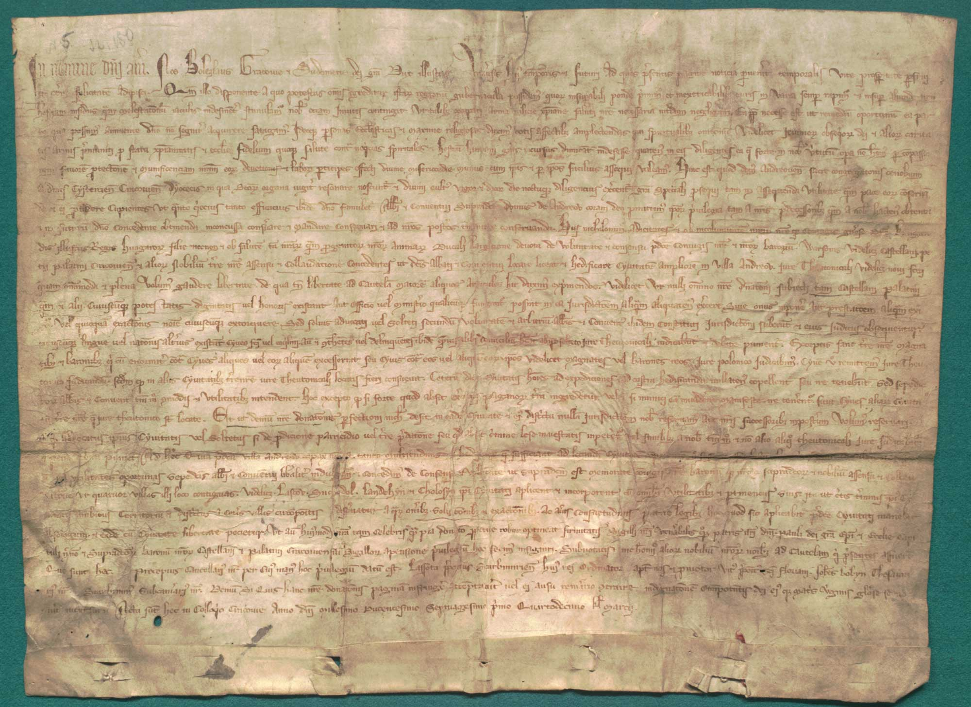 Bolesław, ks. krakowski i sandomierski, zatwierdza prawa klasztoru cystersów w Jędrzejowie, zezwala na lokację miasta na prawie niemieckim i nadaje mu 4 wsie: Lasków, Suchodół, Landchyn [Łączyn?] i Chołoszyn. Język: łac. Opis zewnętrzny: oryg., 1 k. pergaminowa, 34,2 x 46,5 + 2,7 cm; 7 nacięć po pieczęciach